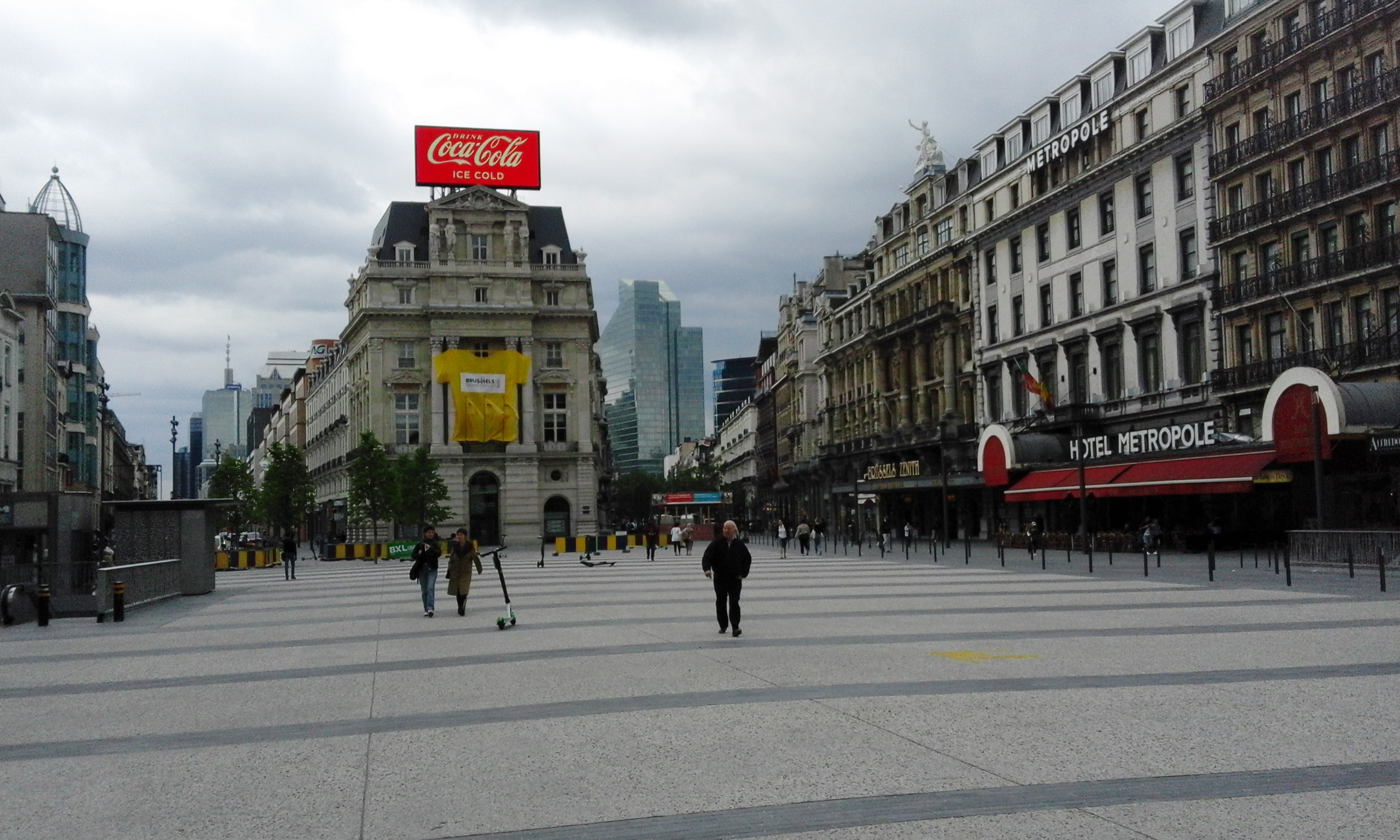 La Place de Brouckère, à Bruxelles, Belgique, en 2019, après les travaux de réaménagement, avec l'Hôtel Continental et l'Hôtel Métropole.